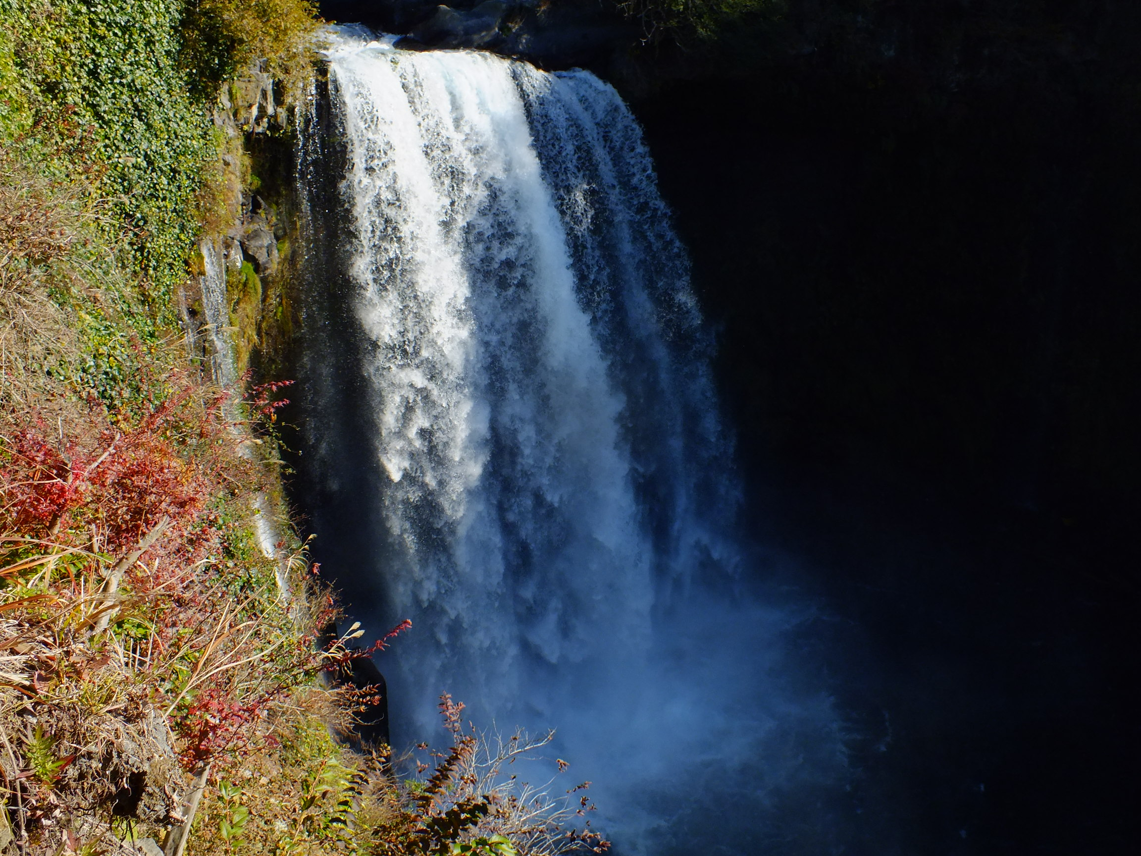 2013-12-02 Shiraito Falls, Fujinomiya(白糸の滝)